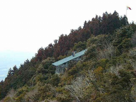 山頂のランチャー台